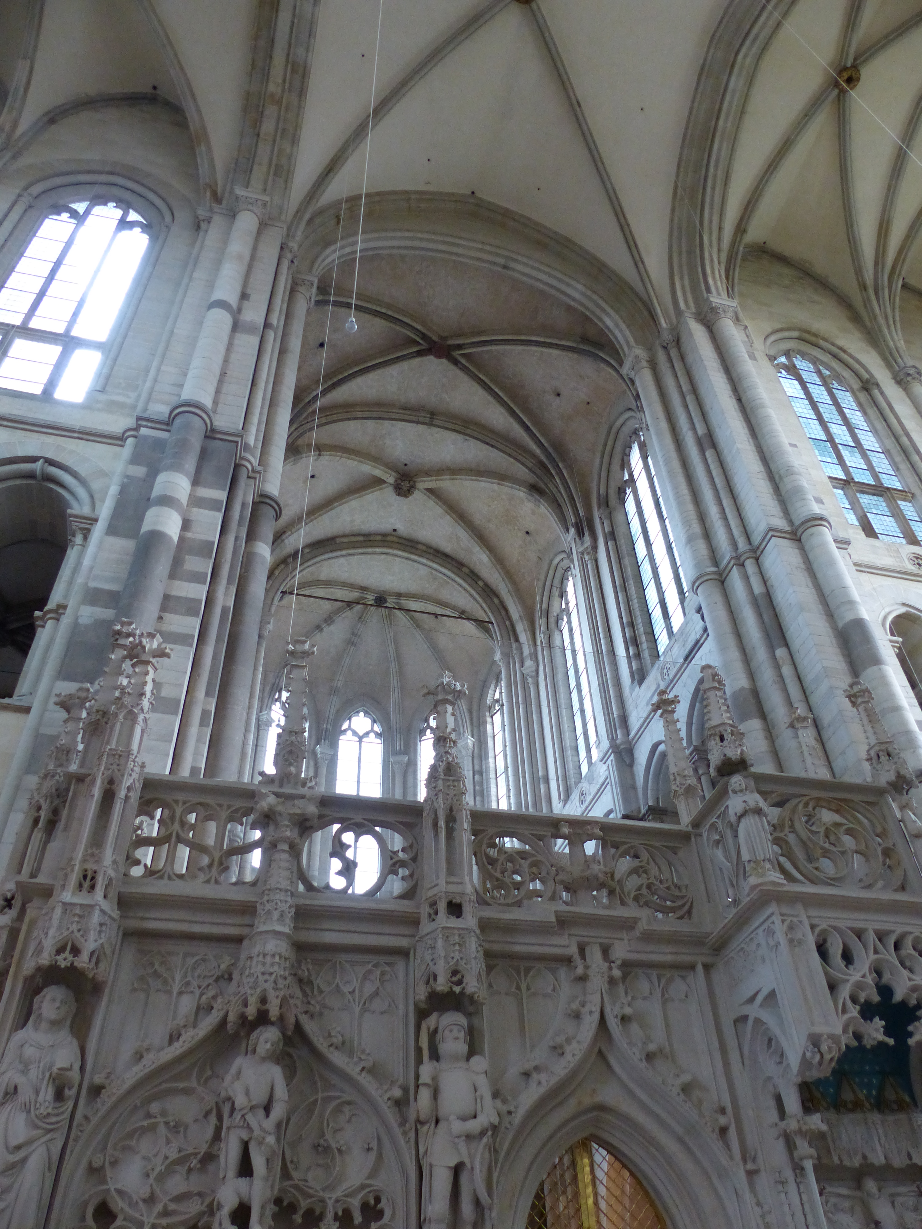 Magdeburger Dom: Hochchor aus der Vierung gesehen